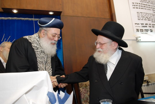 ישיבת מרכז הרב. אברהם אלקנה כהנא שפירא